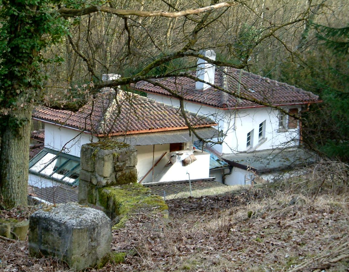 Max Dauthendeys "Waldhaus" am Guggelesgrabenweg in Würzburg